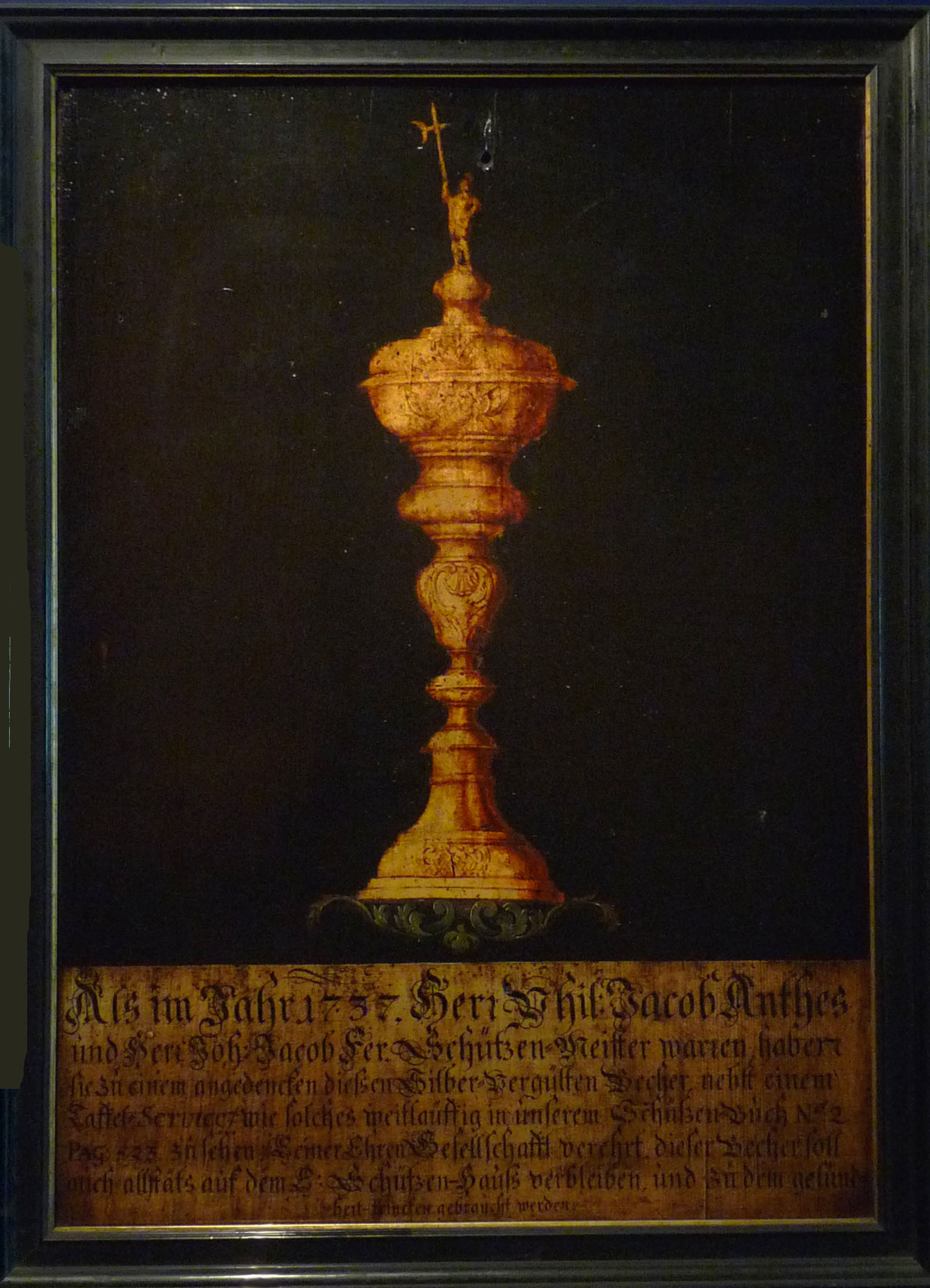 Pièce d'orfèvrerie (1737). Tableau de donation représentant un grand hanap en vermeil offert par Philip Jacob Anthès à la Société d'arquebusiers de Strasbourg, Musée historique de Strasbourg